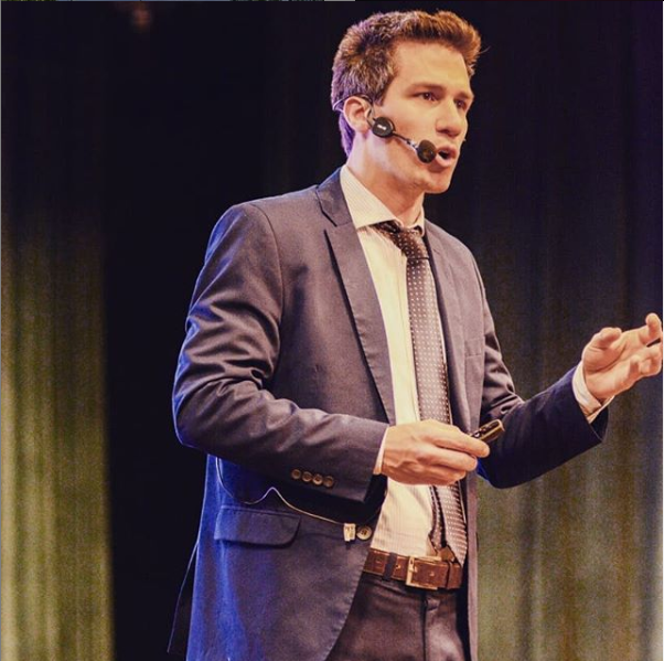 Ivan carrino en conferencia